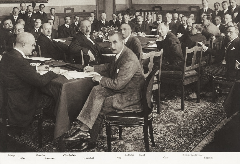 Verträge von Locarno, 1925. Foto E.Steinemann